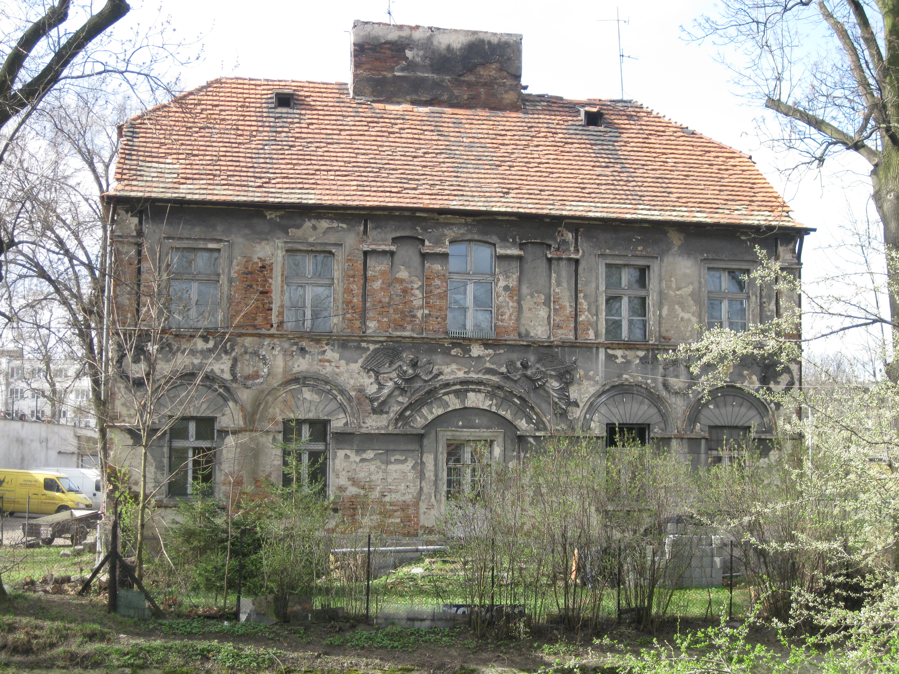 Kalisz - Dom pod Aniołami